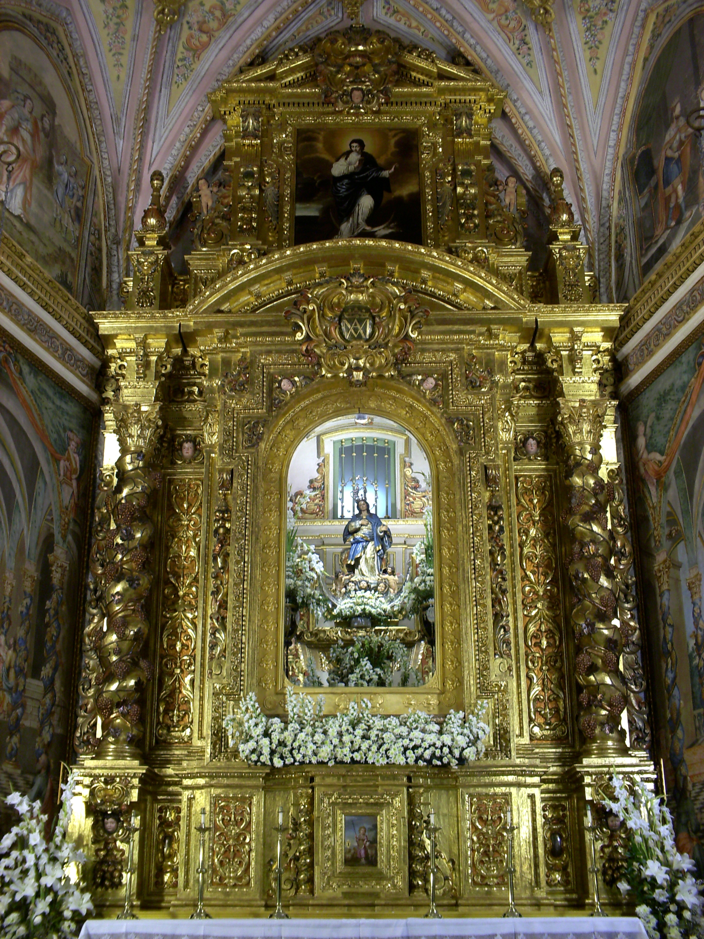 Retablo de la Inmaculada, en la Iglesia de San Andrés de Jaén.